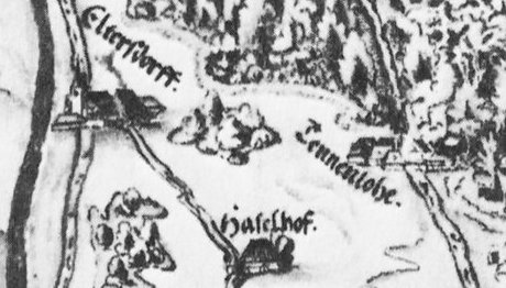 Ausschnitt aus der Großen Wald- und Fraißkarte Das Nürnberger Gebiet bis an die Grenzwasser. Schwarzweißabbildung einer 1623 von Johannes Müllner kolorierten Karte auf der Grundlage eines 1563 angefertigten Kupferstichs von Jörg Nöttelein. Das Bild zeigt die Orte Eltersdorf, Tennenlohe und das später abgegangenen Gut Haselhof.